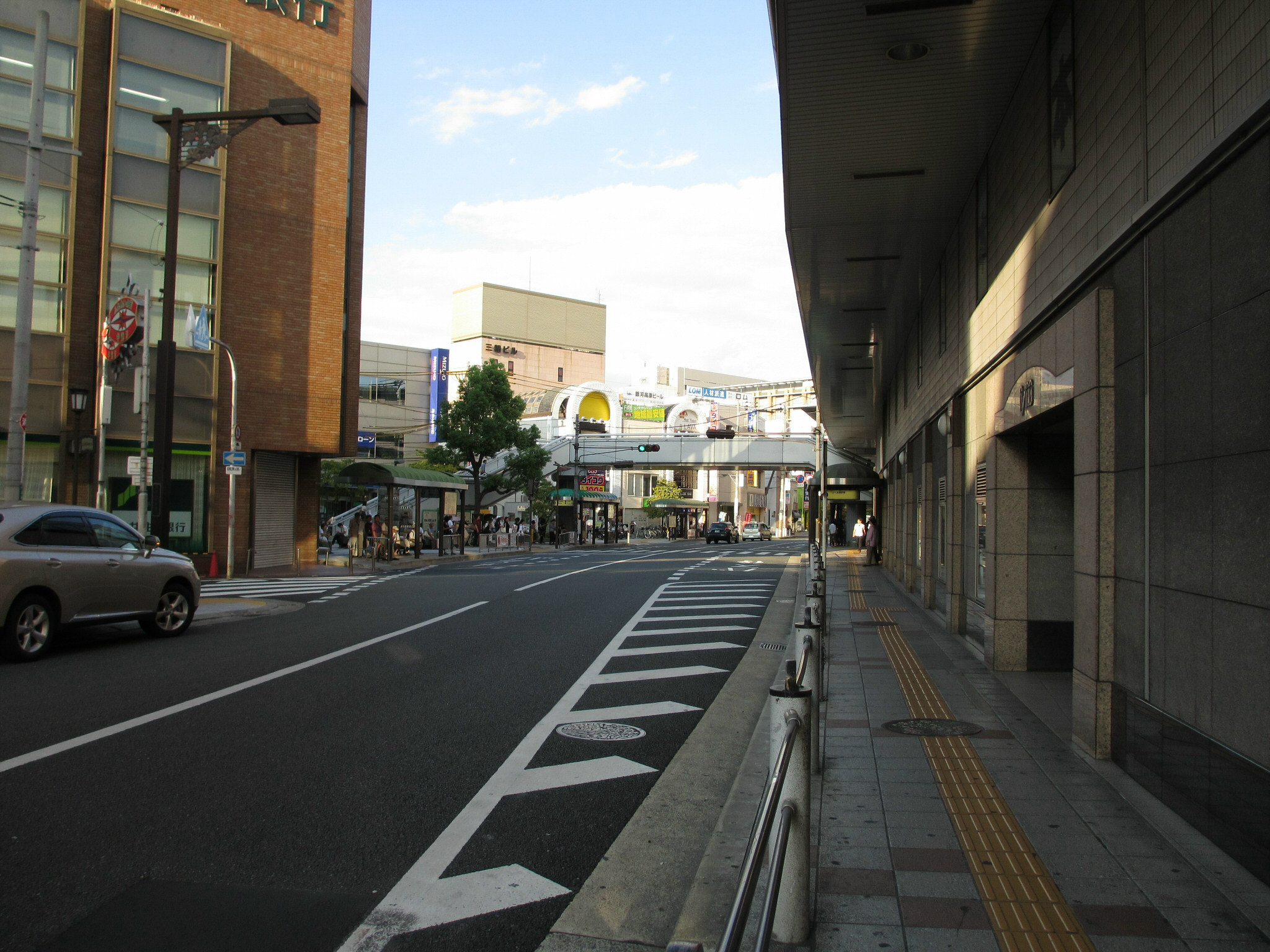 Hankyu Takatsukishi Station